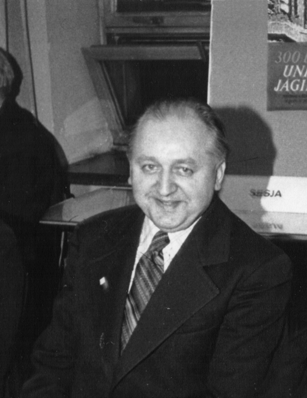 Zdzisław Konicki portret 25 kwietnia 1975 5862 fot M Z Wojalski